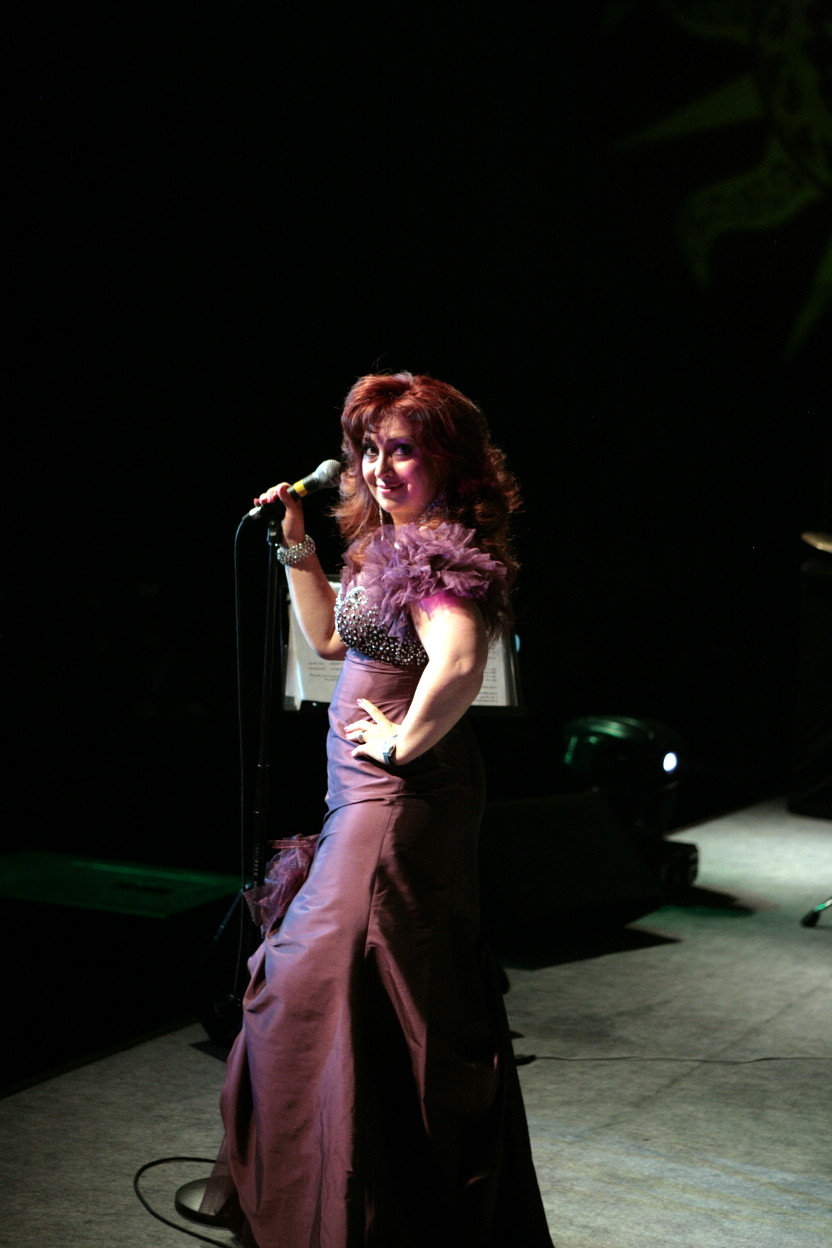 Liela & Mansour Malaysia 2009.